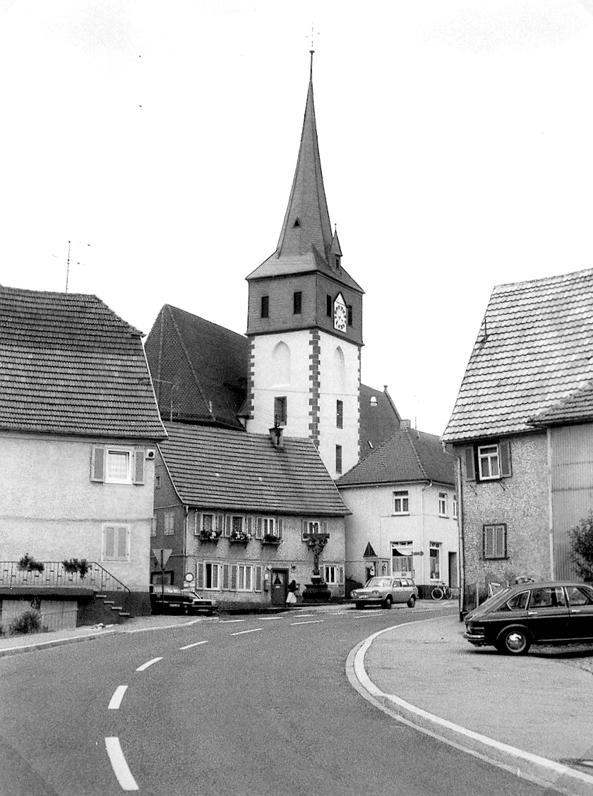 Tiefenbronn